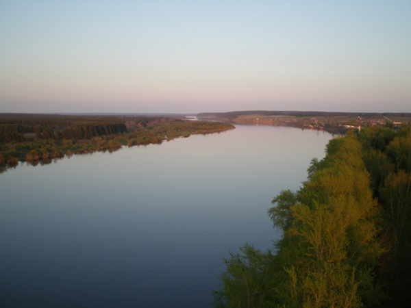 Река Кама в июле